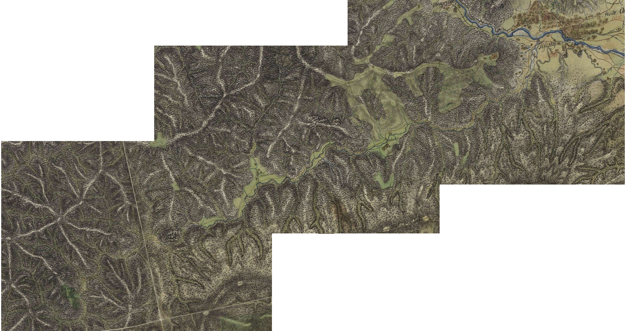 Valea Slănicului, ținutul Bacăului în Prima ridicare topografică Iosefină (1788–1790).